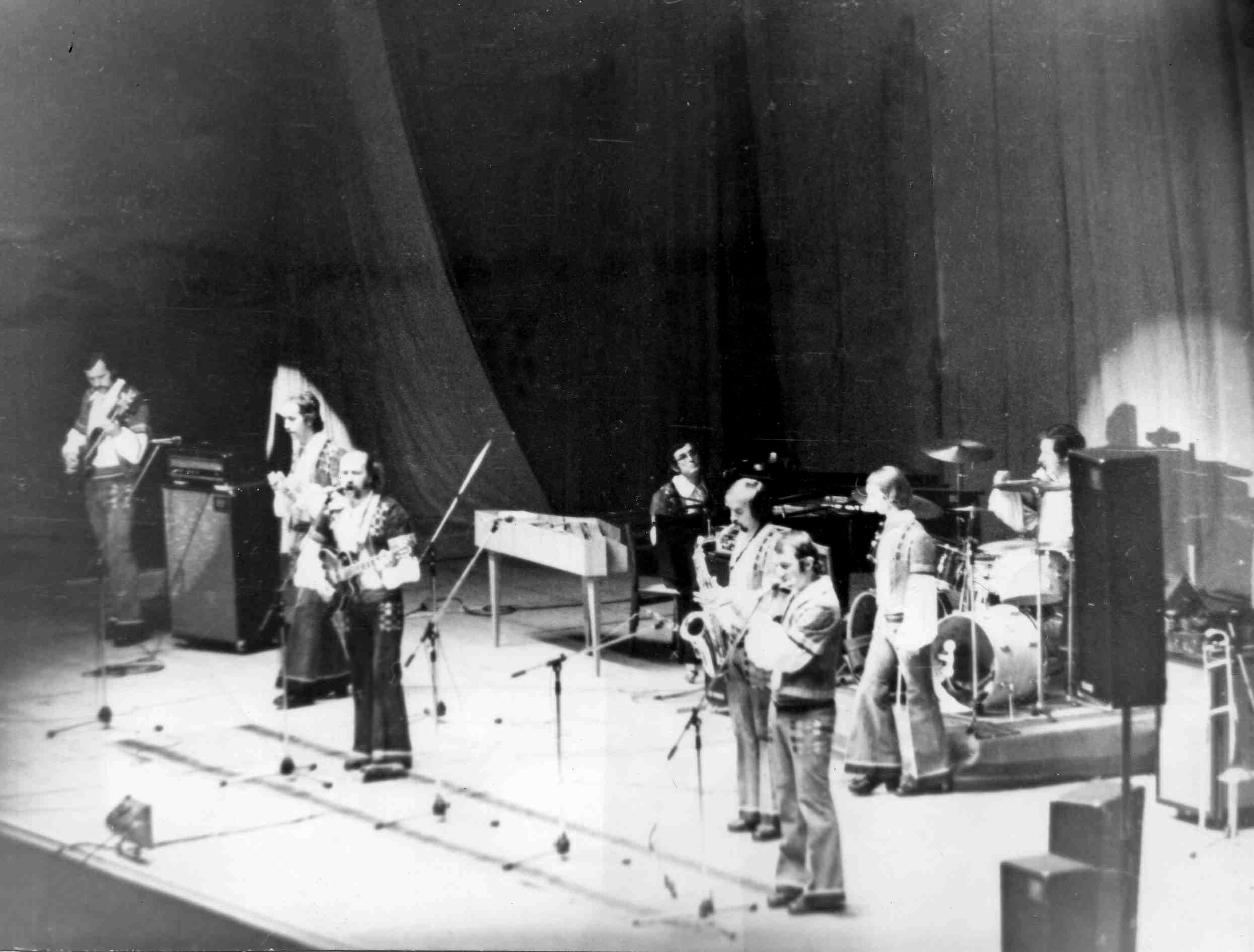 Группа "Песняры" в Ярославле 1974г.